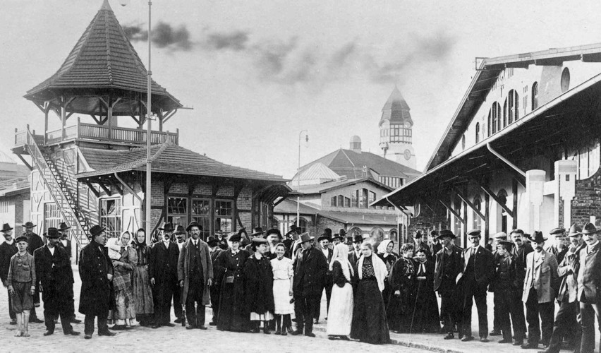 Auswanderer in der Ballinstad